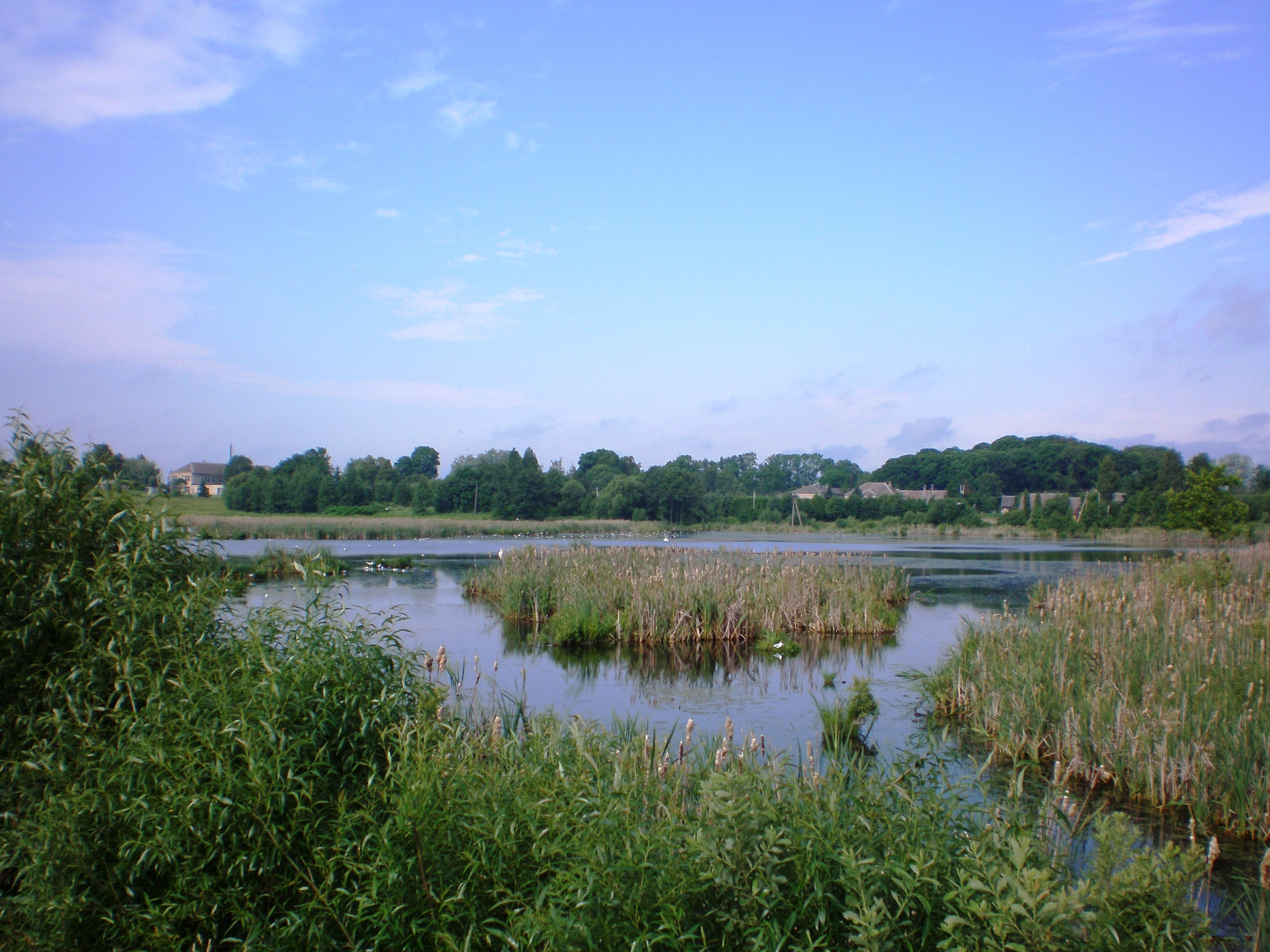 Kašonių ežeras, Kašonys, Prienų raj.